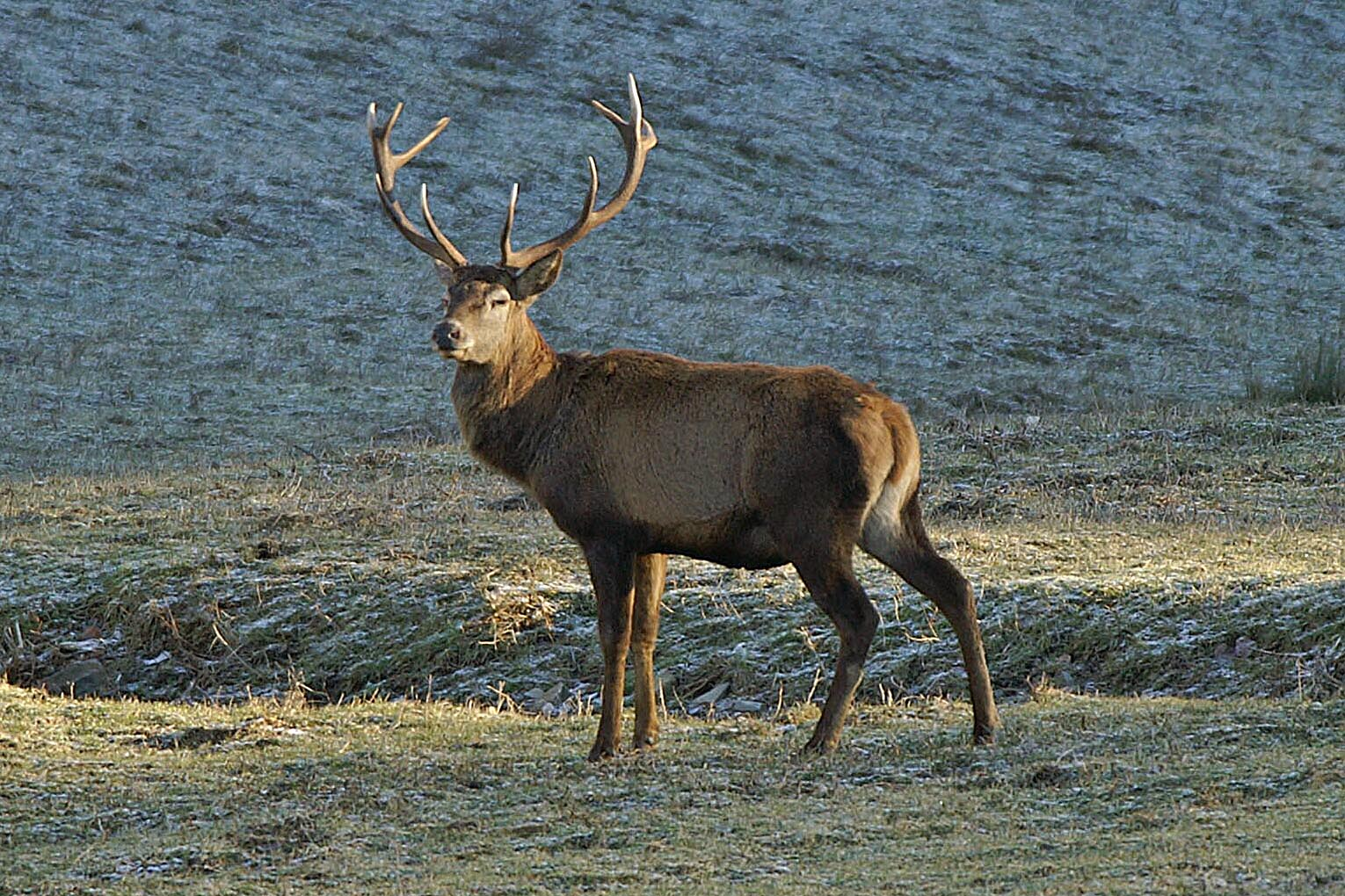 Cervo all'interno del Parco Nazionale delle Foreste Casentinesi Monte Falterona e Campigna